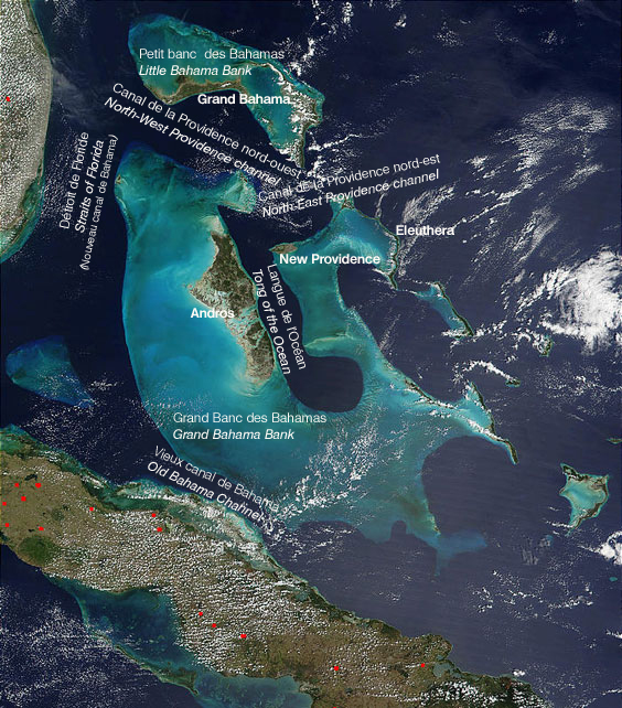 Détroits et canaux autour des îles du Bahamas